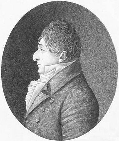 Hartog de Hartog Lémon; gravure (1807) door een anonieme kunstenaar naar een verloren gegane pastel (anoniem).